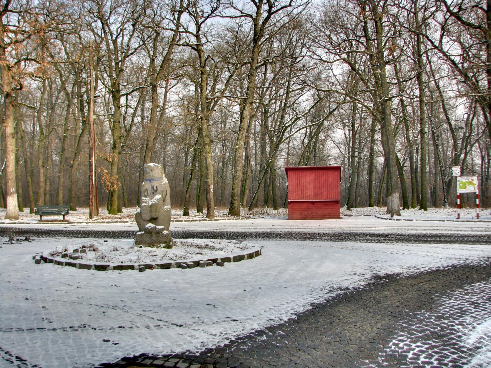 Platoul Cornesti - Winter